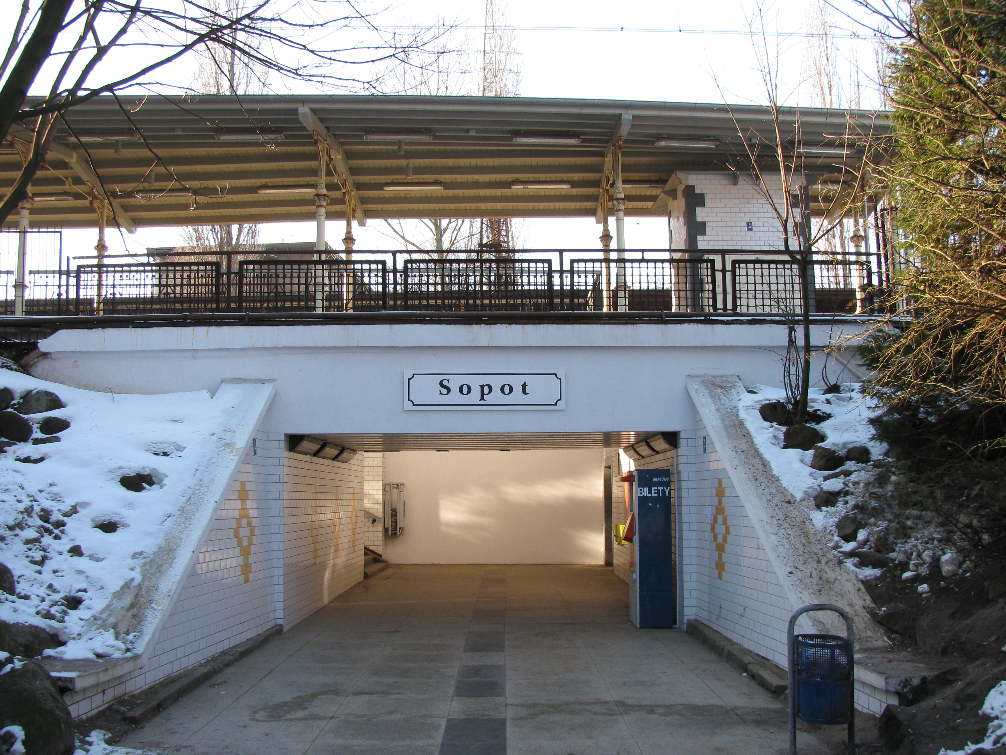 Sopot SKM - tunel i peron podmiejski po renowacji.